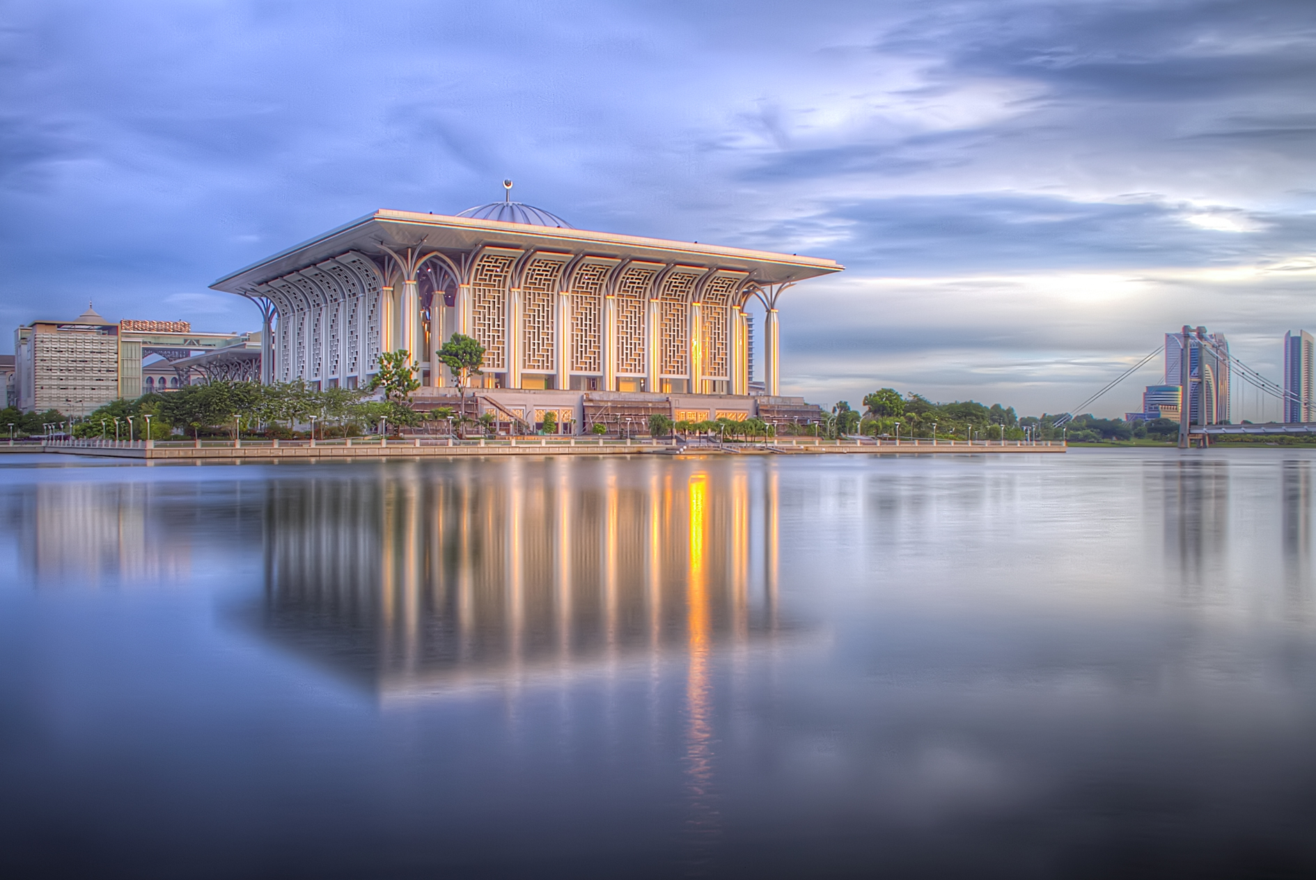 Tuanku Mizan Zainal Abidin Mosque